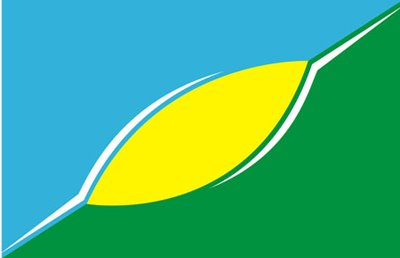 bandera